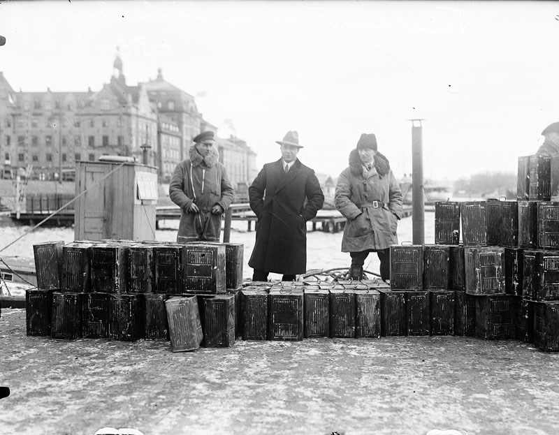 F 9511 Stadsgården. Smuggelsprit från rekordbeslaget vid Sundskär i mars 1930.